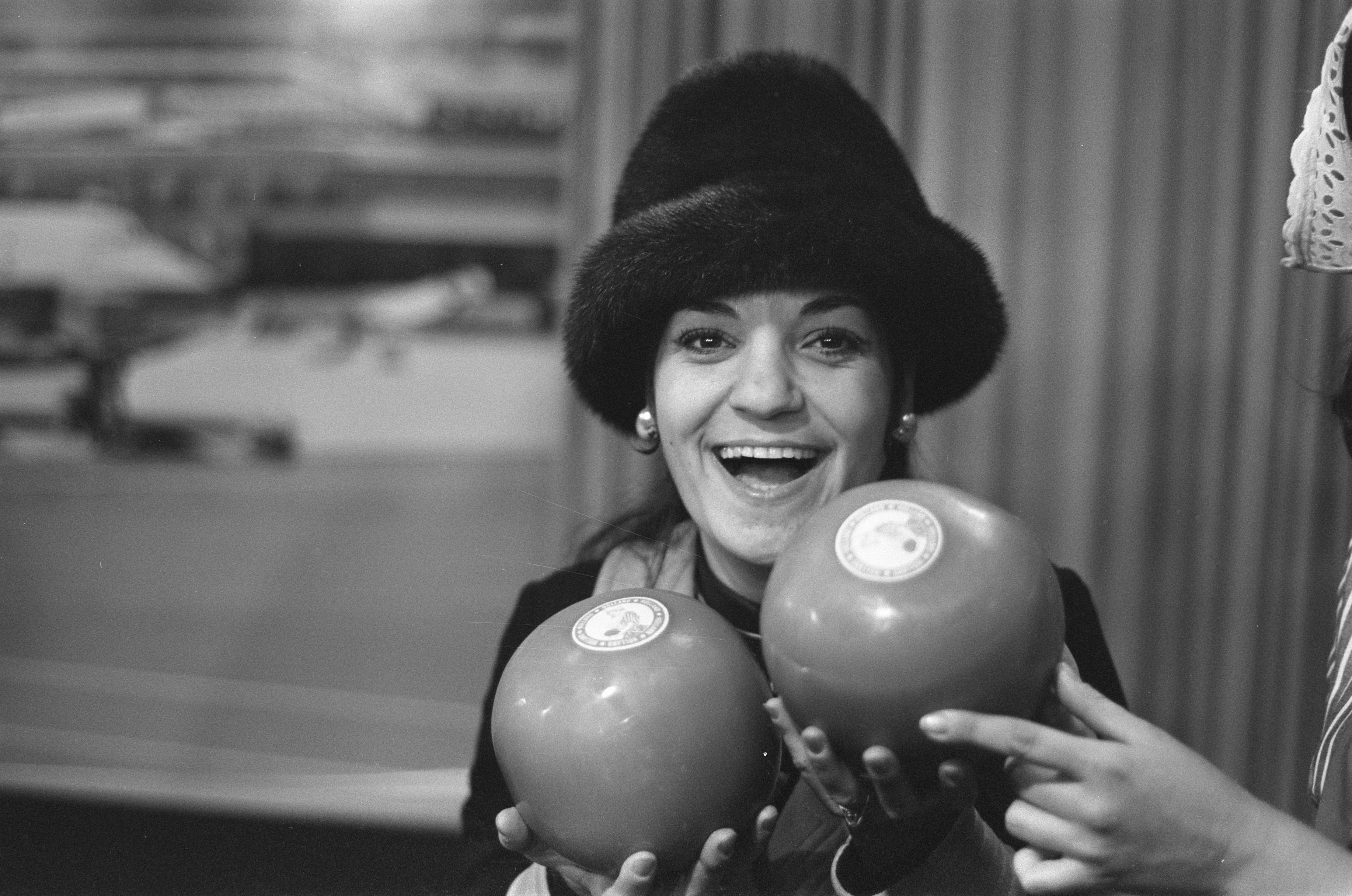 Collectie / Archief : Fotocollectie Anefo Reportage / Serie : [ onbekend ] Beschrijving : Artiesten arriveren op Schiphol i.v.m. optreden voor Unicef Frida Boccara Datum : 13 december 1972 Locatie : Noord-Holland, Schiphol Trefwoorden : ARTIESTEN Persoonsnaam : Frida Boccara Instellingsnaam : UNICEF Fotograaf : Peters, Hans / Anefo Auteursrechthebbende : Nationaal Archief Materiaalsoort : Negatief (zwart/wit) Nummer archiefinventaris : bekijk toegang 2.24.01.05 Bestanddeelnummer : 926-0984